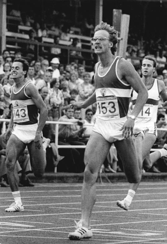 Thomas Schönlebe, Jens Carlowitz, Mathias Schering ADN-ZB Koard 21.8.87-co-Potsdam: 38. DDR-Leichtathletik-Meisterschaften - Mit neuem Europarekord von 44,48 Sekunden eroberte sich der Karl-Marx-Städter Thomas Schönlebe (153) den Meistertitel über 400 Meter vor seinem Klubkameraden Jens Carlowitz (l., 143) und Mathias Schering (hinter Schönlebe) vom SC Chemie Halle.